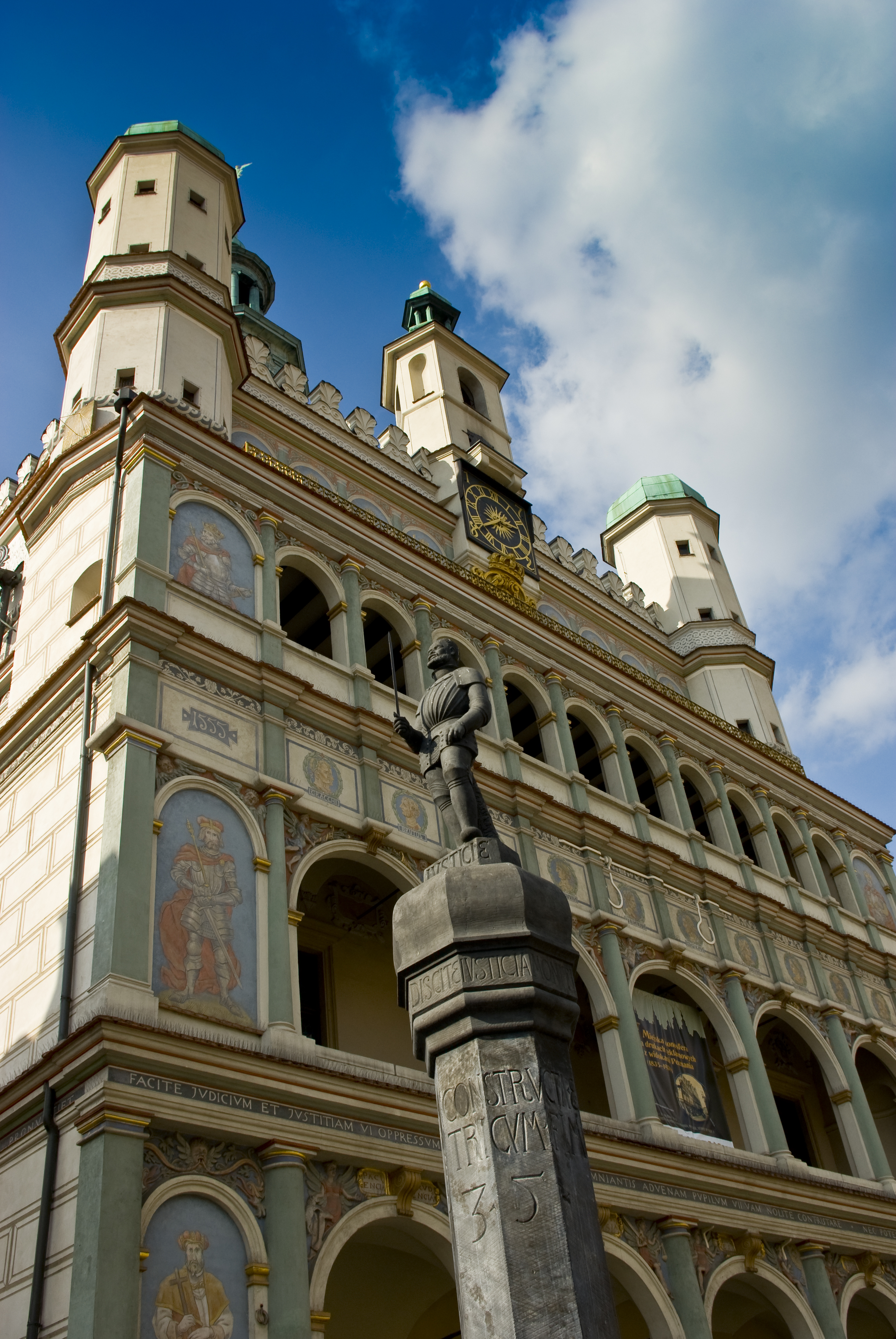 Ratusz na Starym Rynku w Poznaniu (zabytek nr A 007)